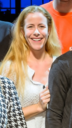 Maike Boerdam namens de musical Hartsvrienden in Koninklijk Theater Carré in Amsterdam tijdens de ING Valentijnsdag op 15 februari 2015.